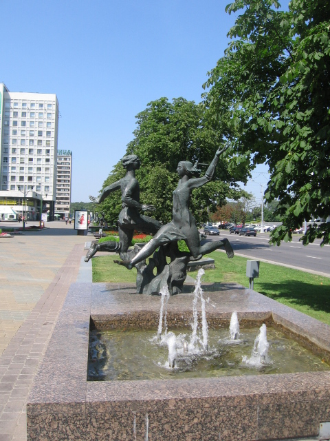 Ряд фонтанов на проспекте Победителей